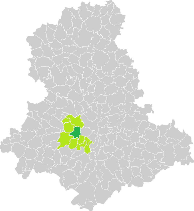 Carte de situation de la commune d'Aixe-sur-Vienne (en vert foncé) dans le votre Canton (en vert clair) sur une carte des communes de la Haute-Vienne